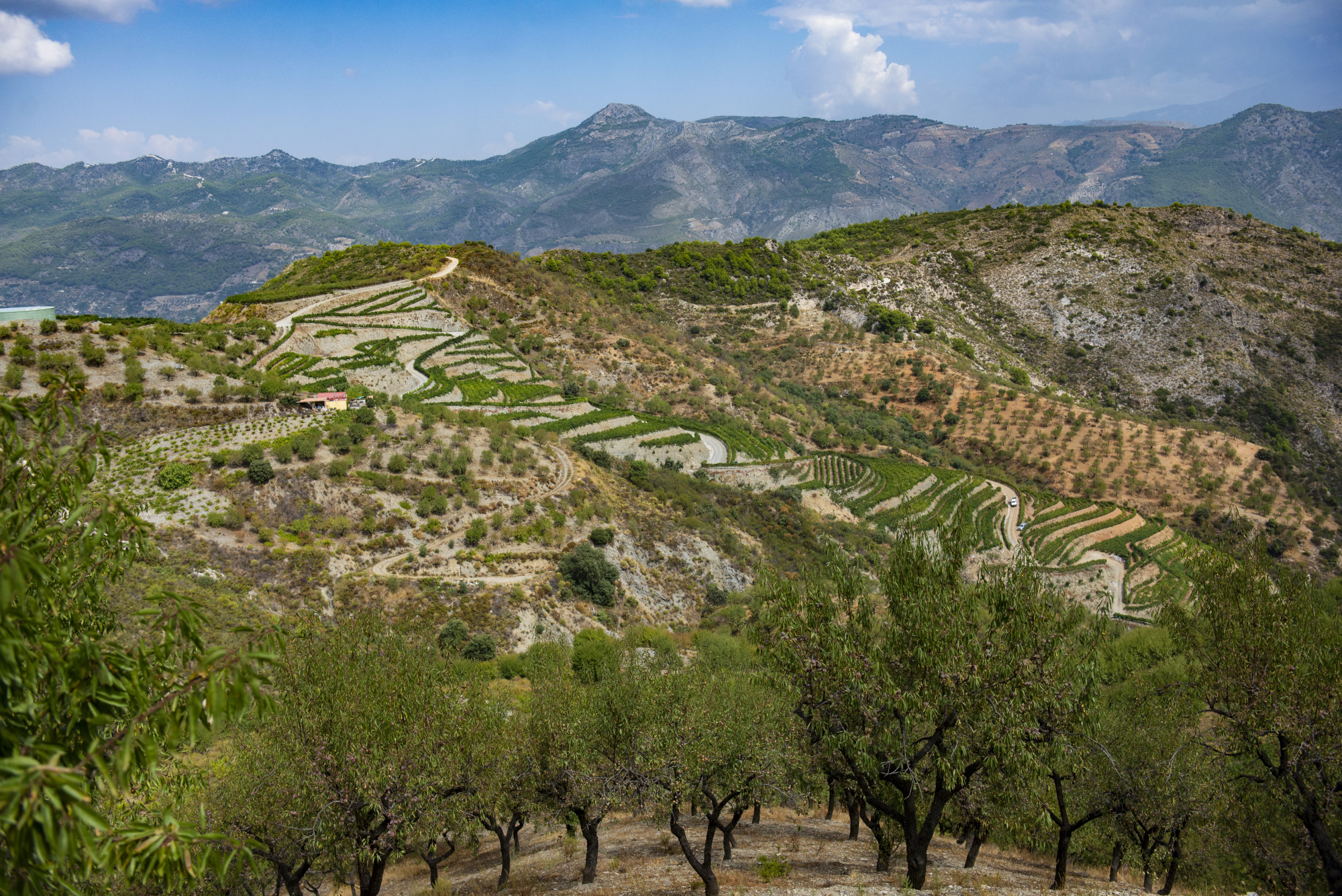 Fotos: J.M. Grimaldi / Junta de Andalucía Bodegas Calvente, Spain